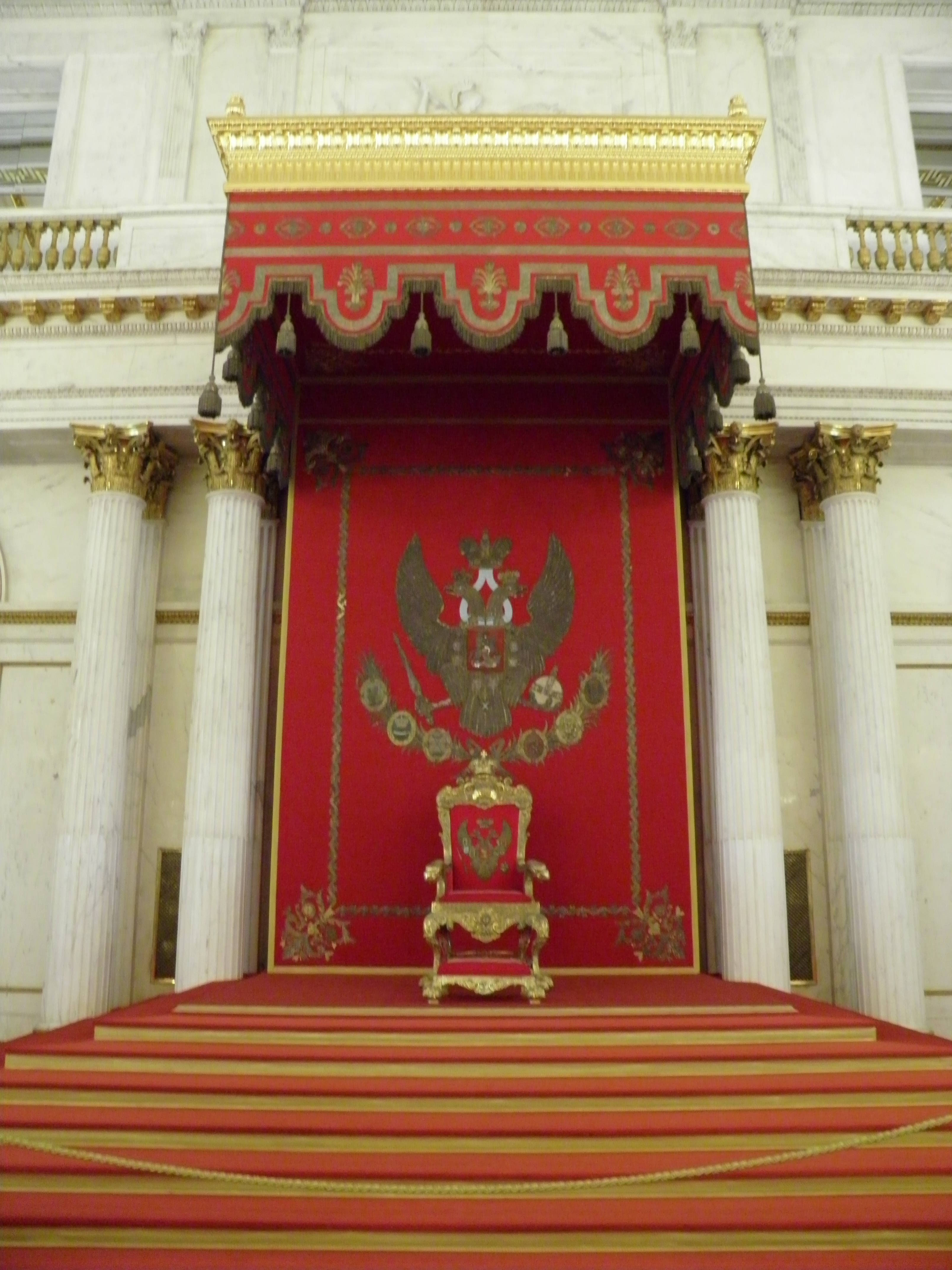 Hall Saint-Georges au musée de l'Ermitage à Saint-Pétersbourg (Russie).